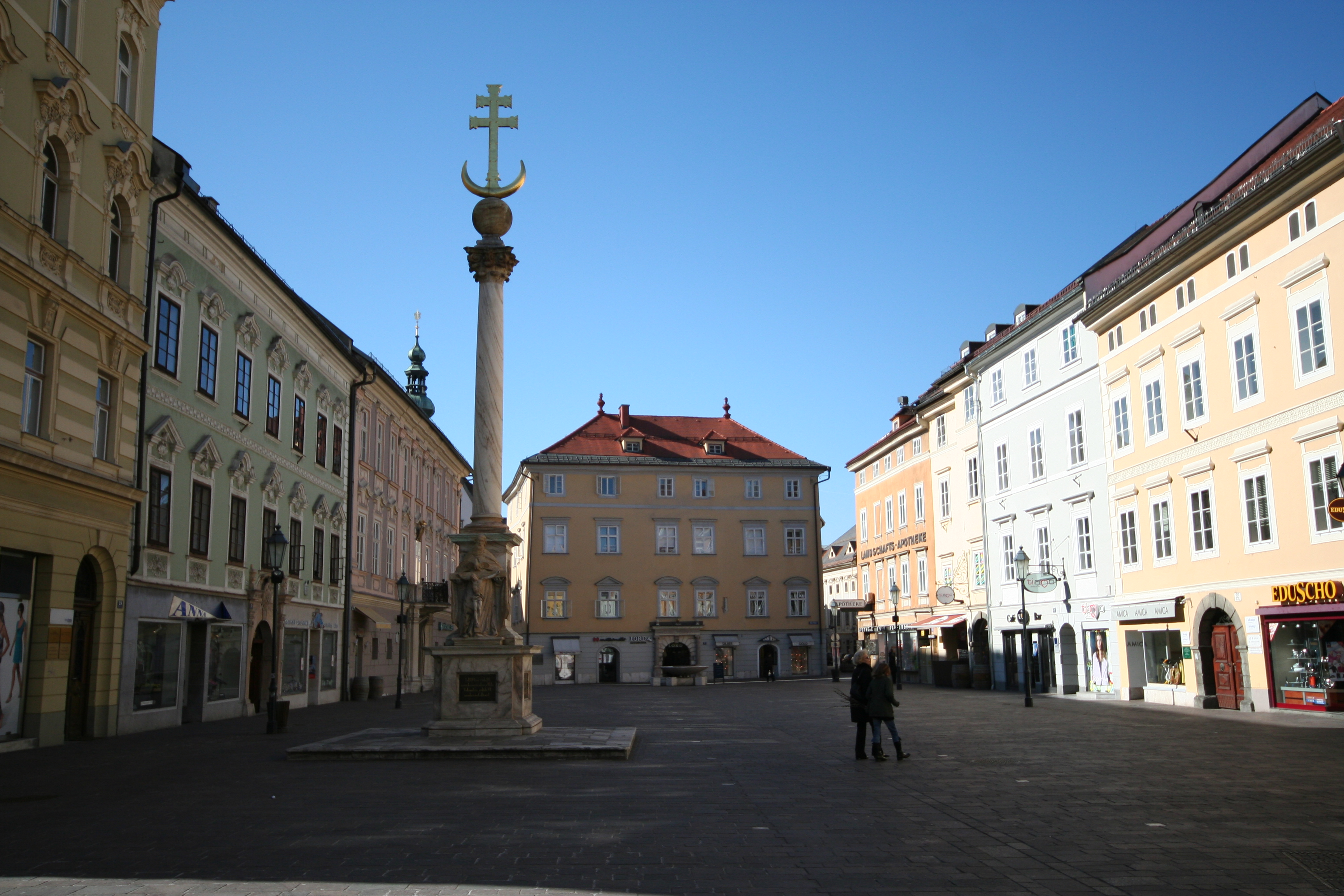 Alter Platz, Klagenfurt